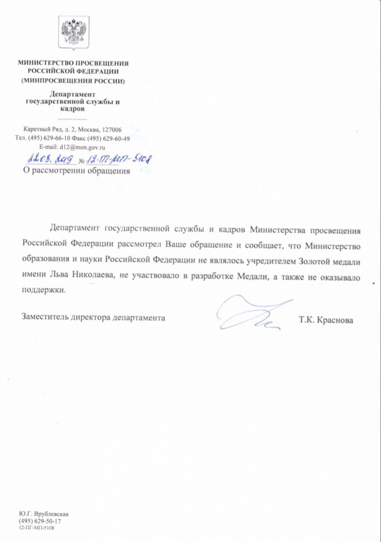 Письмо Министерства просвещения Российской Федерации о Золотой медали имени Льва Николаева